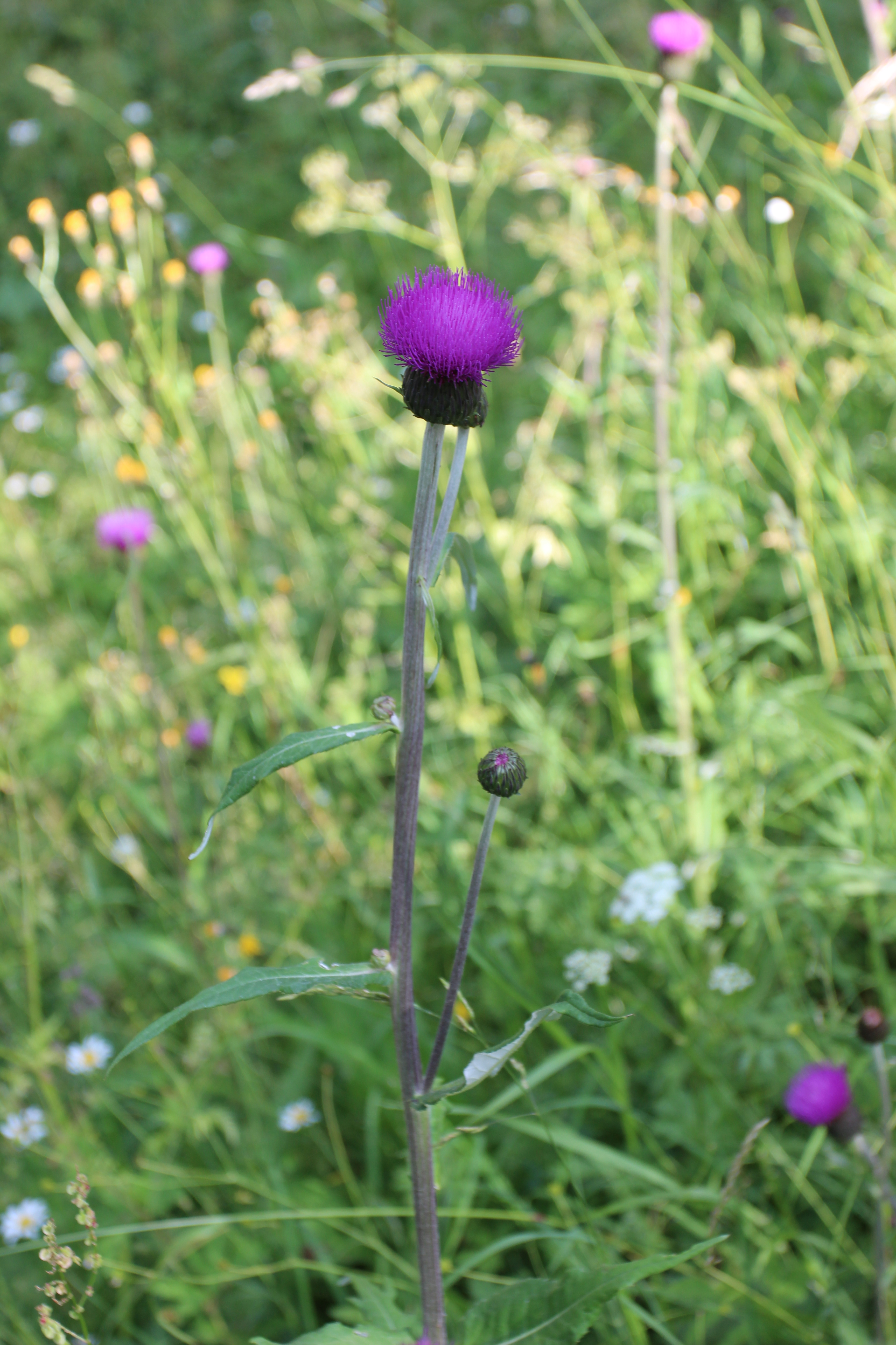 Verschiedenblättrige Kratzdistel (Cirsium heterophyllum)